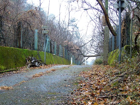 船坂峠 旧道（歩行者・自転車専用道） 兵庫県側から岡山県側を望む 右に大正15年（1926年）建立の県境石碑が立つ